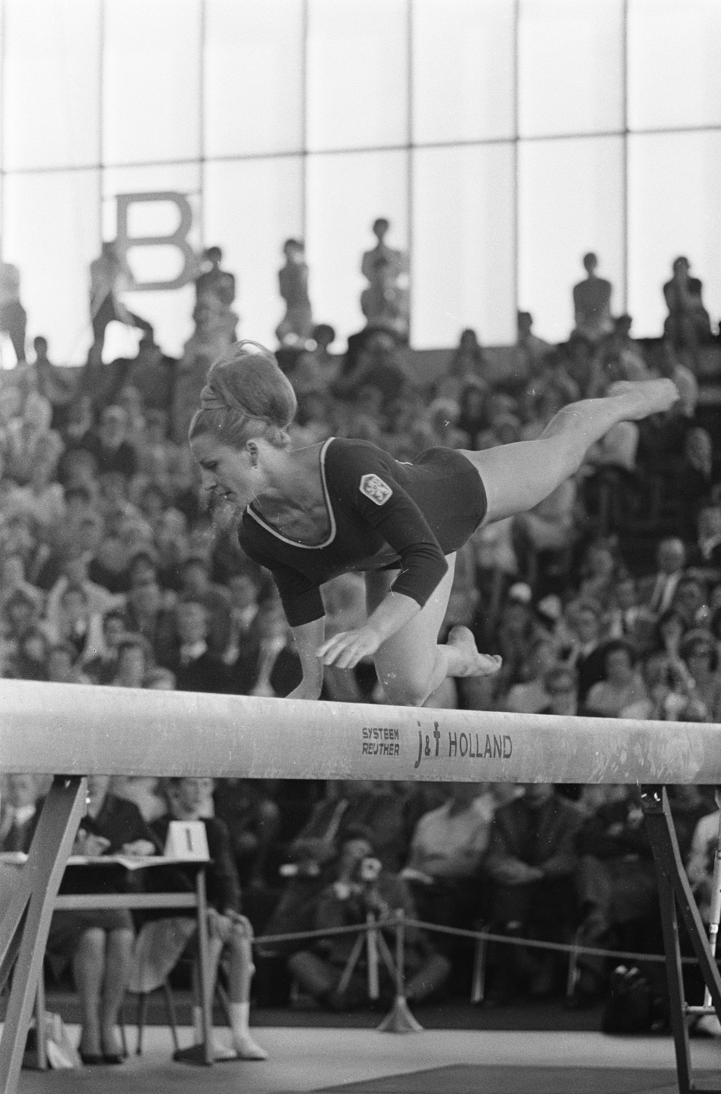 Collectie / Archief : Fotocollectie Anefo Reportage / Serie : [ onbekend ] Beschrijving : Europese turnkampioenschappen, Vera Caslavska (evenwichtsbalk) Datum : 28 mei 1967 Trefwoorden : kampioenschappen, turnen Persoonsnaam : Caslavska, Vera Fotograaf : Kroon, Ron / Anefo Auteursrechthebbende : Nationaal Archief Materiaalsoort : Negatief (zwart/wit) Nummer archiefinventaris : bekijk toegang 2.24.01.05 Bestanddeelnummer : 920-3571